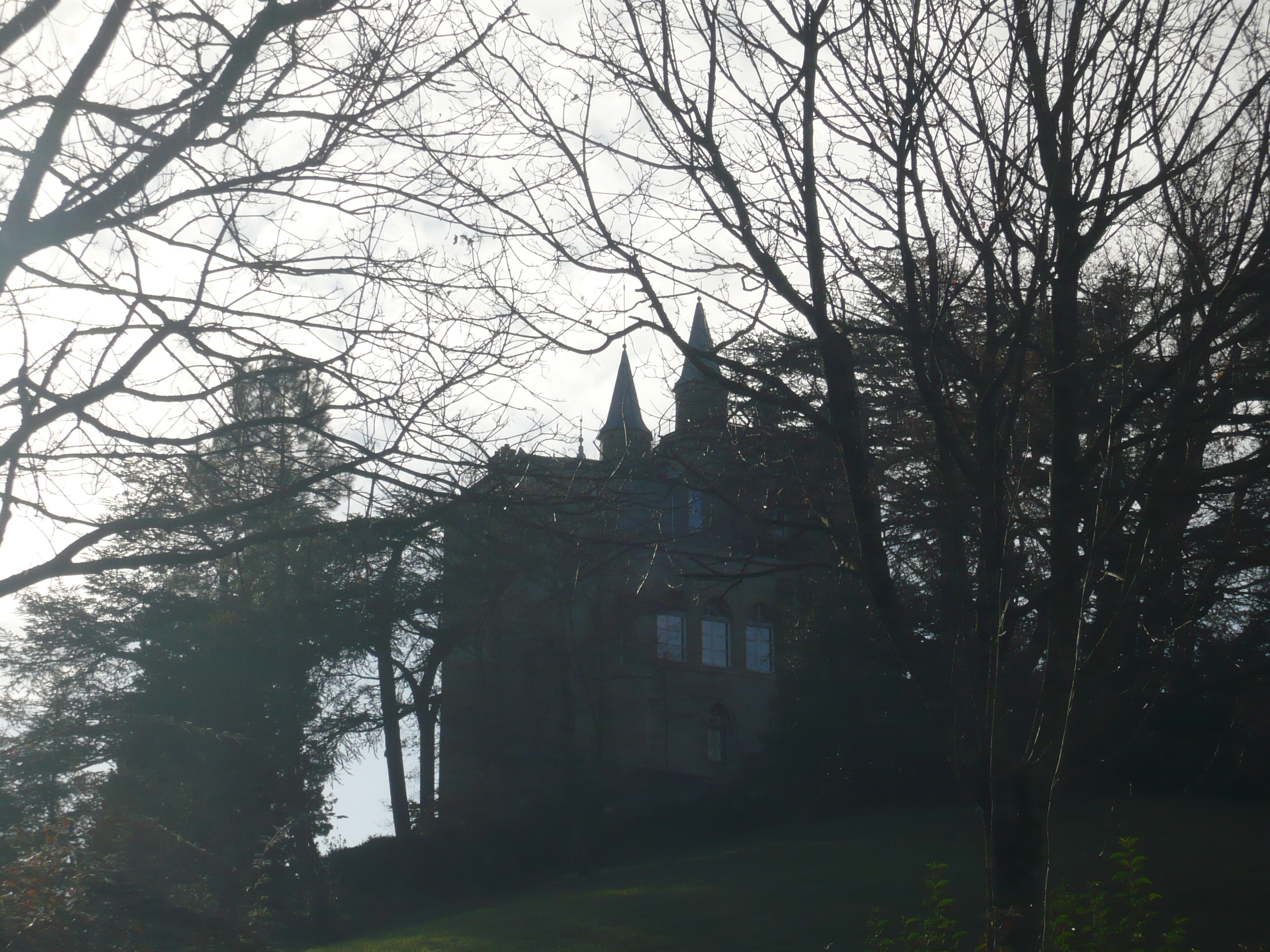 Château composé de tourelles se trouvant sur les hauteurs de Castres dans le département français du Tarn.